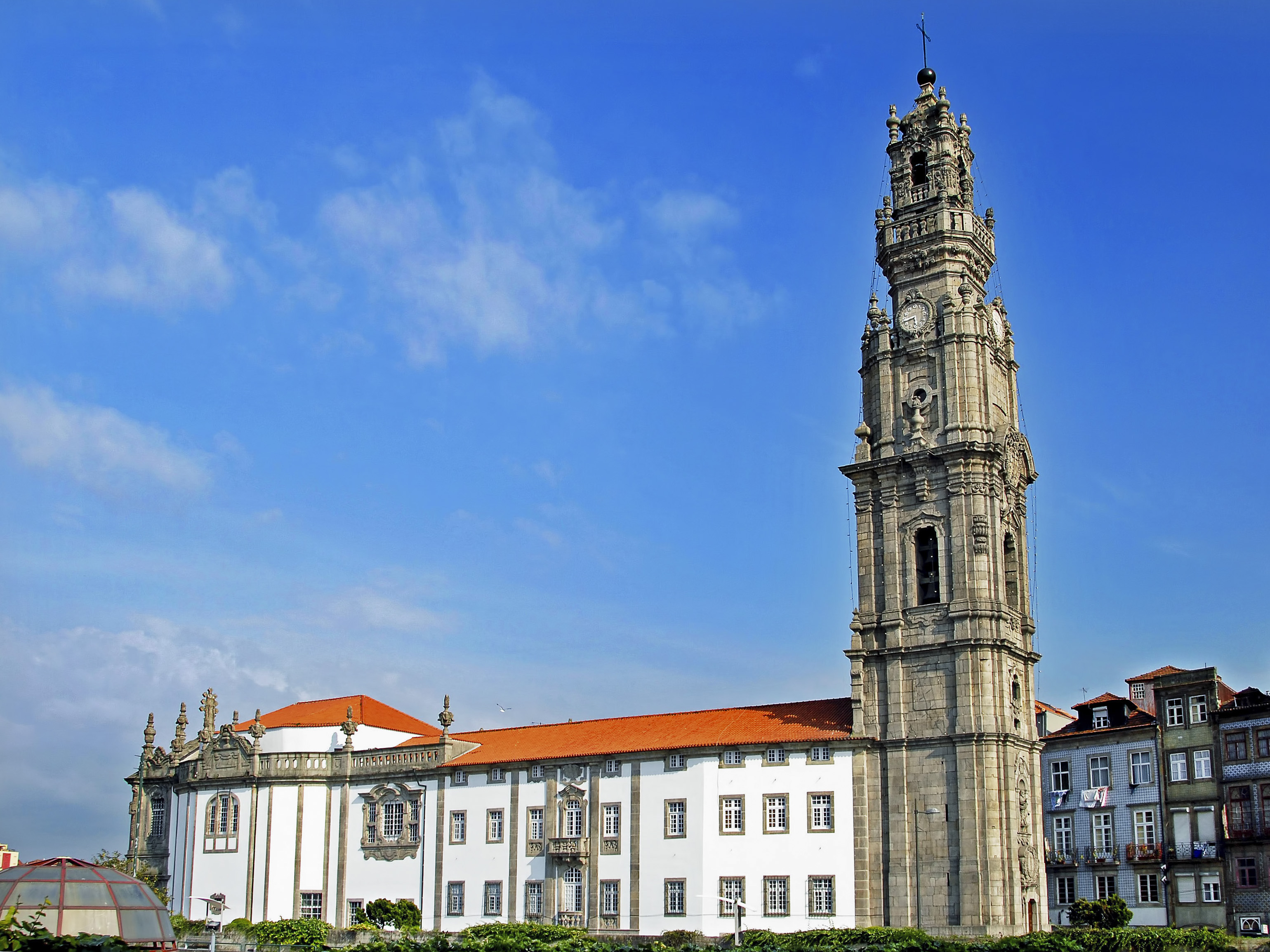 Igreja e Torre dos Clérigos This file was uploaded for Wiki Loves Monuments in Portugal with the unique identifier 70401.